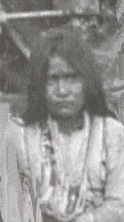 Portrait de Dahteste.